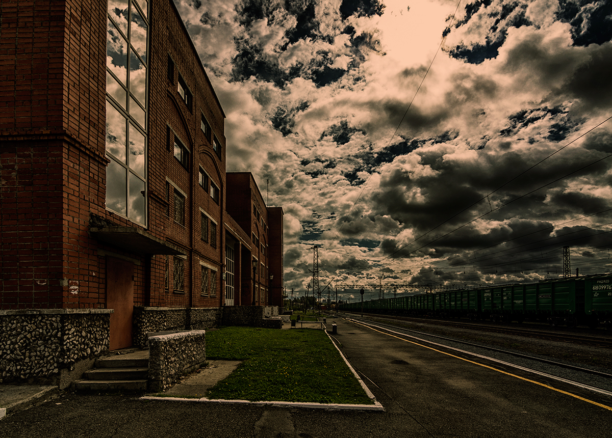 Вокзал ст. Смычка (нечетная платформа)